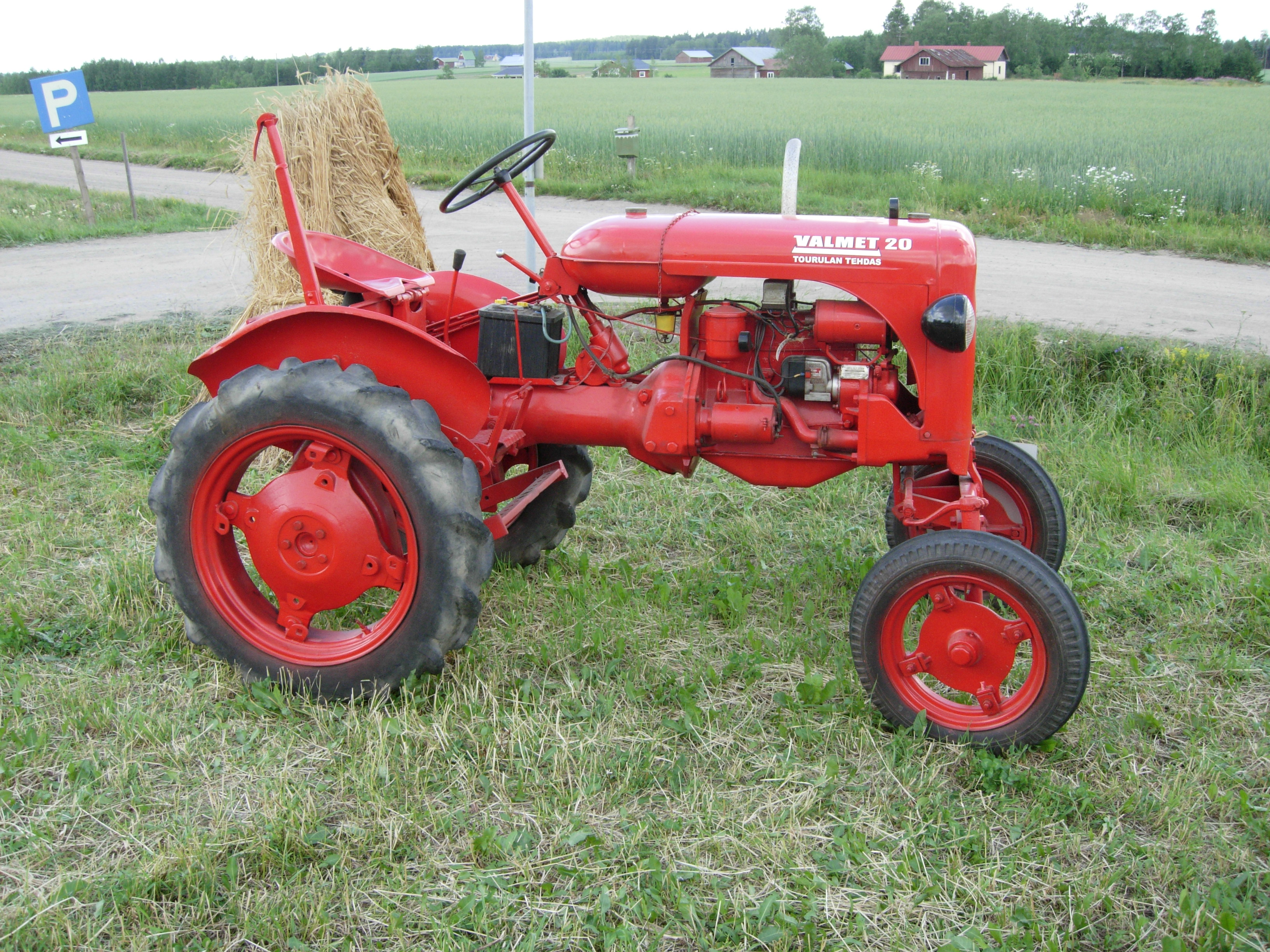 Valmet 20 traktori